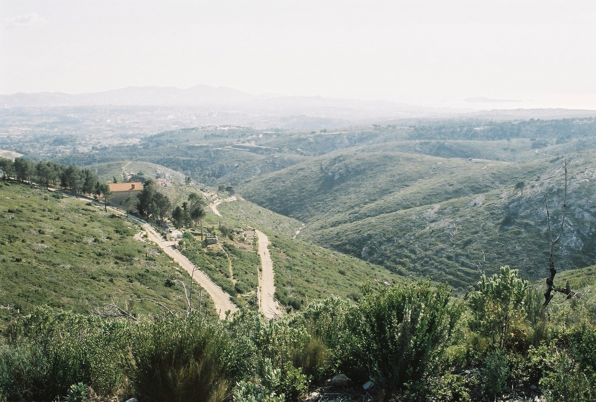 Sur le flanc sud du massif de l'Étoile, au-dessus de Palama : à gauche une maison isolée, à droite on distingue d'anciennes cultures en terrasses.